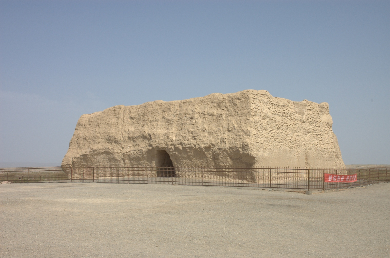 敦煌玉门关小方城遗址